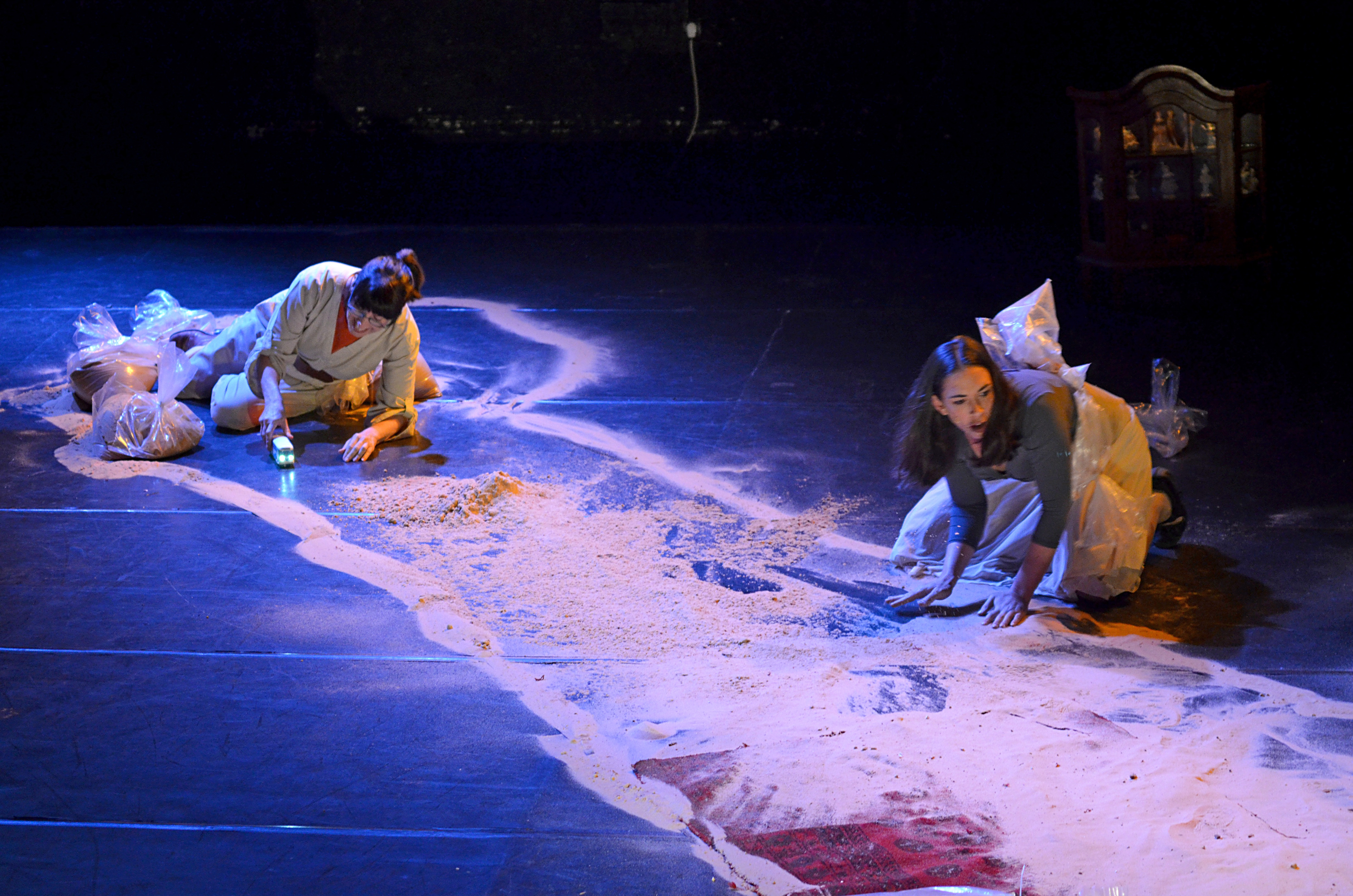 גליה יואלי ונעמי יואלי בנפיץ בתמונע צילום אורי רובינשטיין